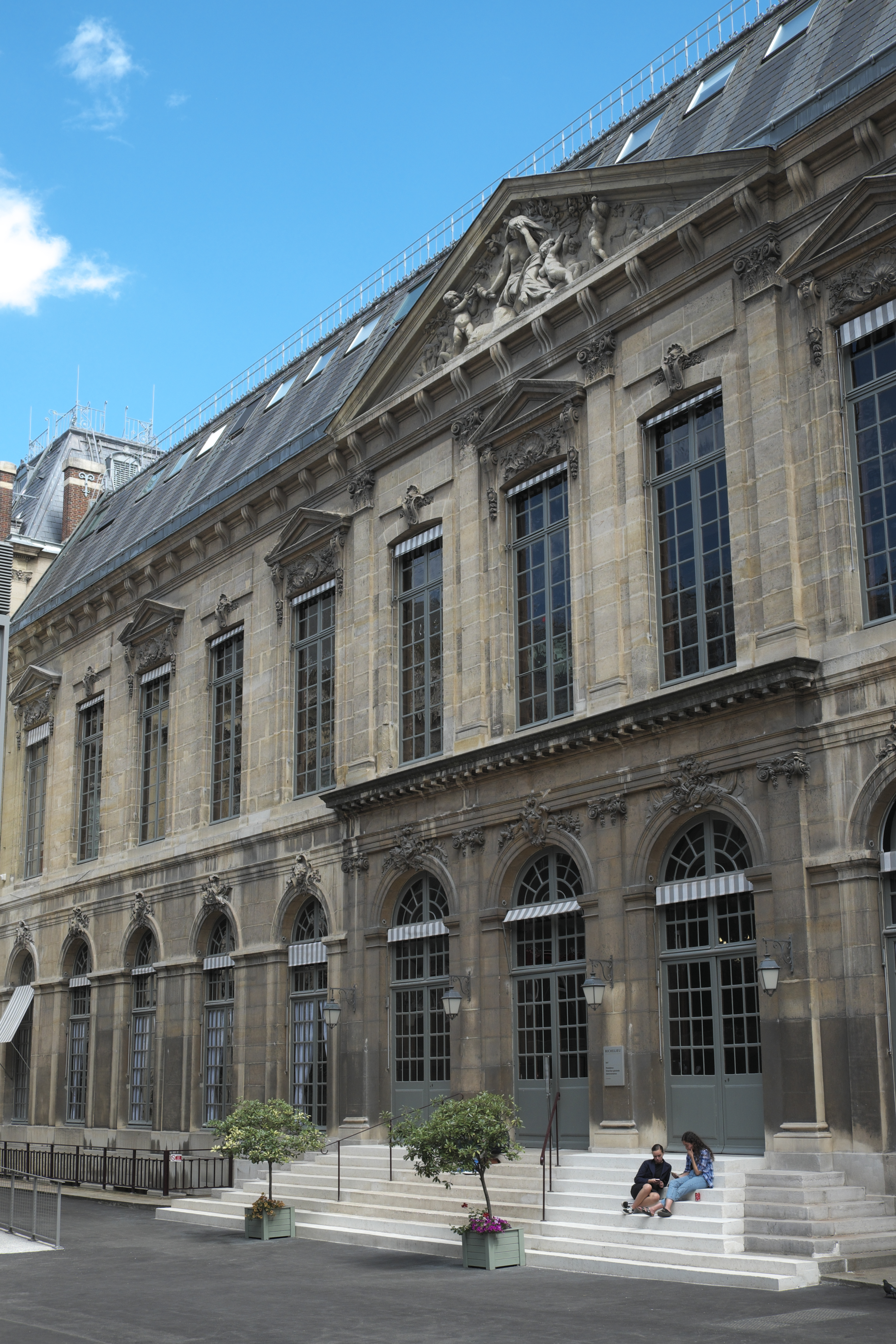 Bibliothèque nationale de France, Site Richelieu-Louvois im 2. Arrondissement von Paris